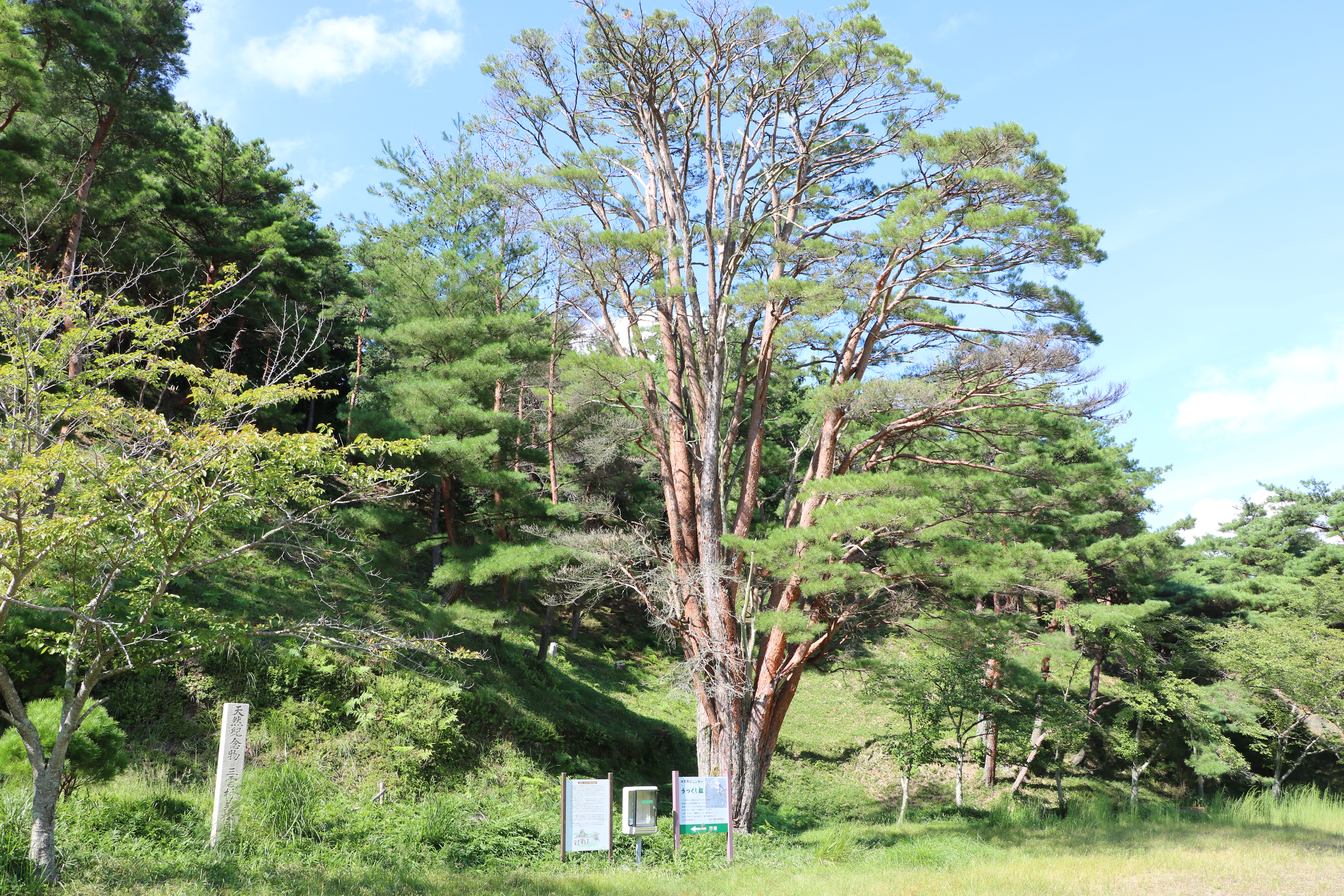 平松のウツクシマツ自生地（国指定天然記念物、滋賀県湖南市）